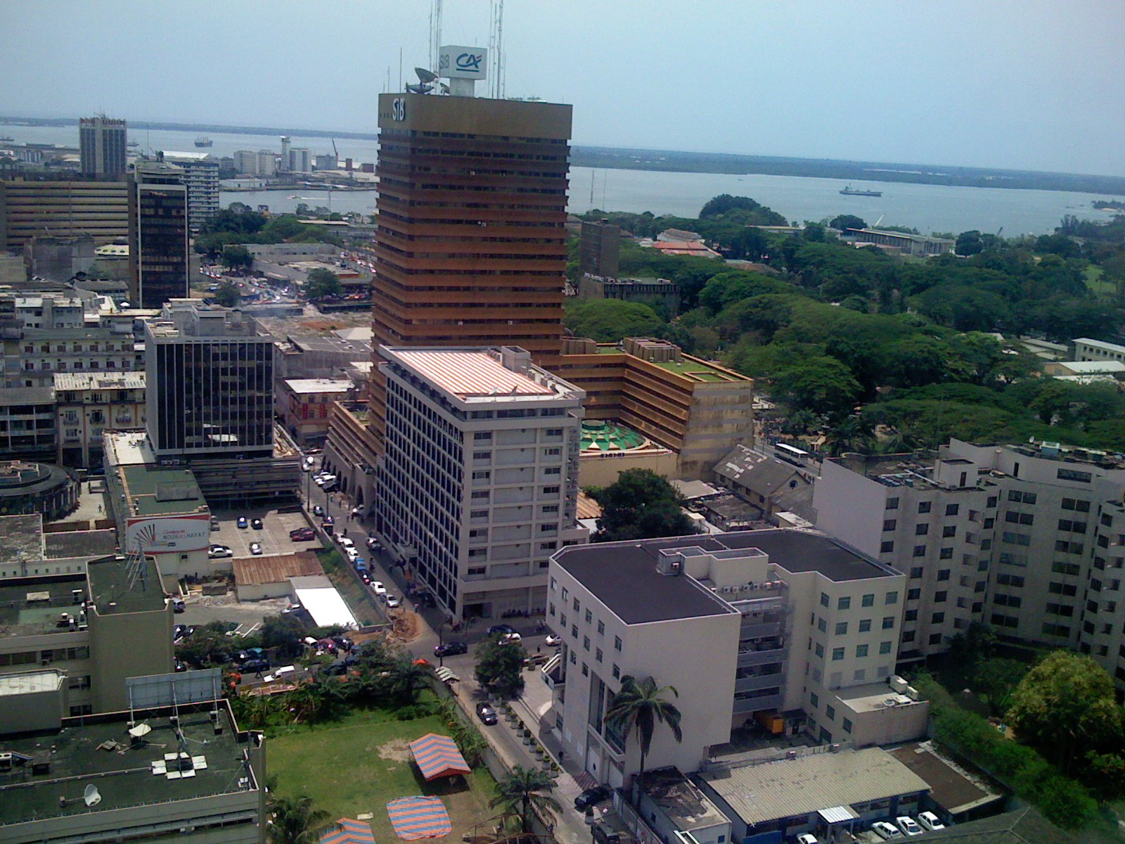 Vue aérienne Abidjan Plateau (Côte d'Ivoire)